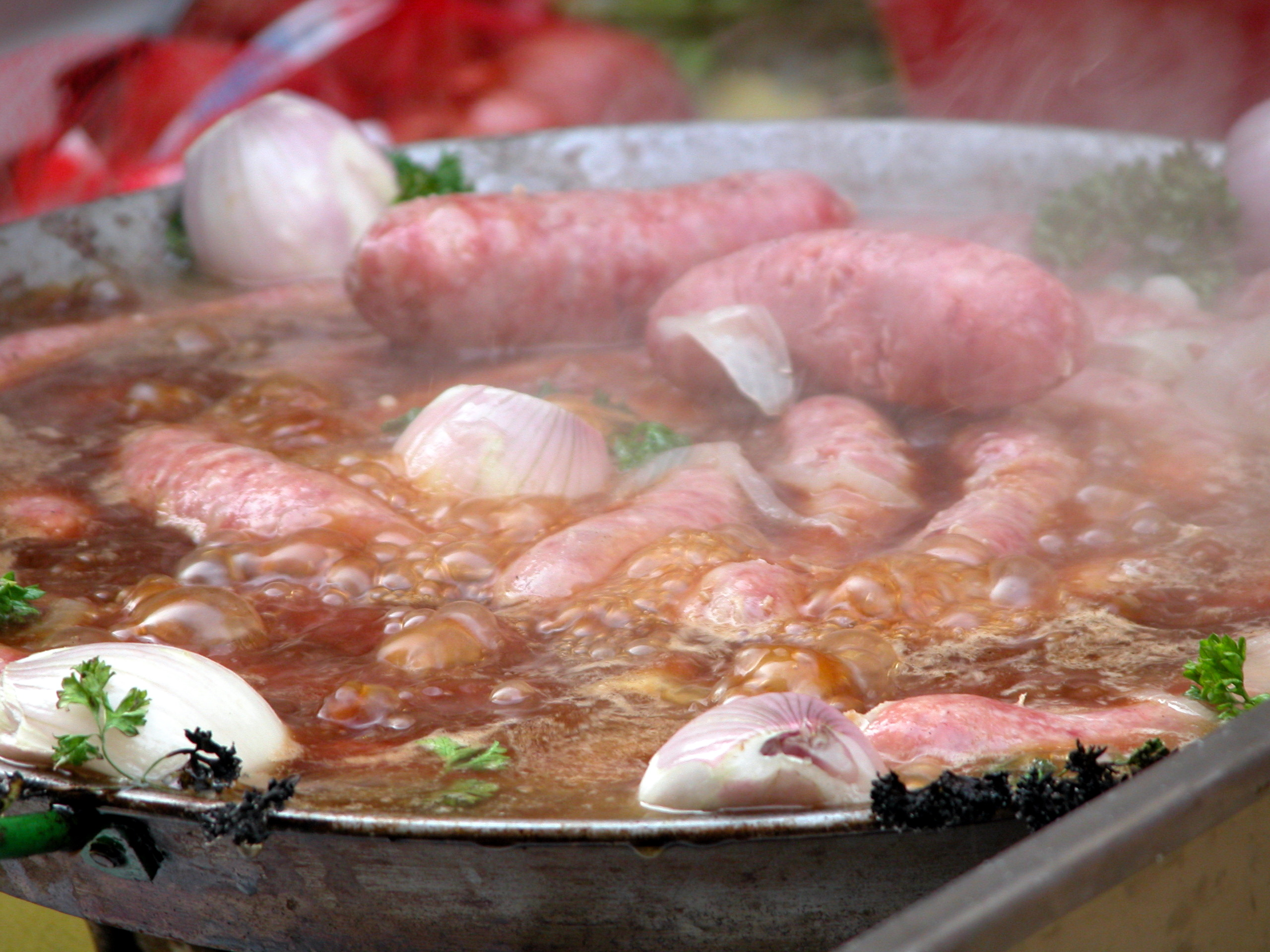 Cuisson des diots de Savoie.